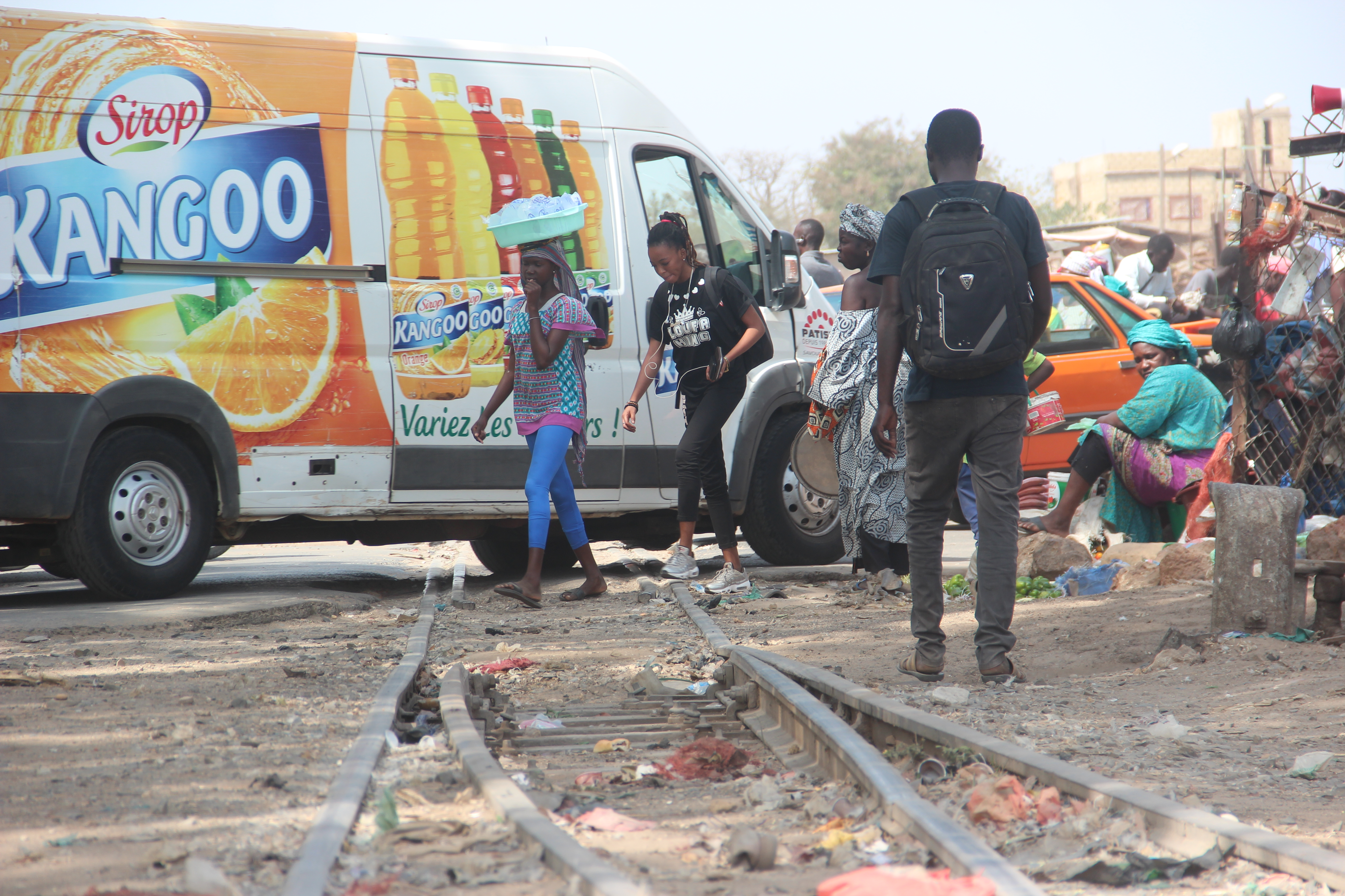 "Passage à niveau" à Thiès, Sénégal. This is an image with the theme "Africa on the Move or Transport" from: Senegal